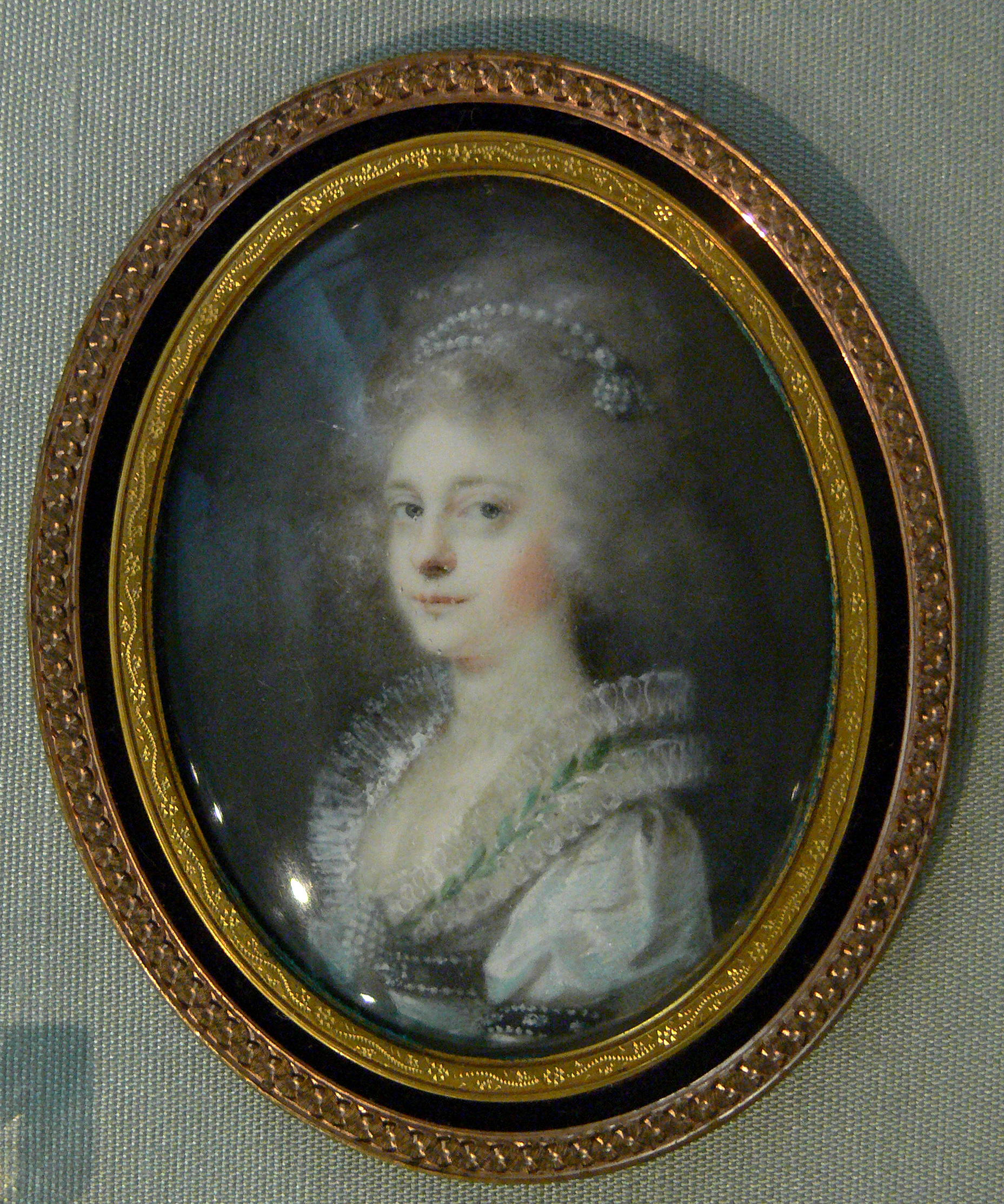 Bildnis der Prinzessin Elisabeth Wilhelmine von Württemberg in weißer Atlasrobe; Wien vor 1790